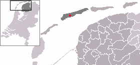 Locatie van Midsland op Terschelling, zelf gemaakt uit sjabloon van Wikipedia-gebruiker Mtcv